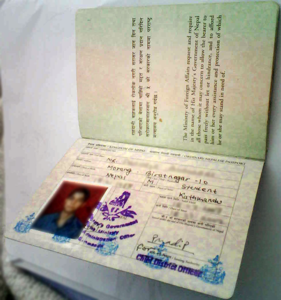 Nepalese Passport (Inside)